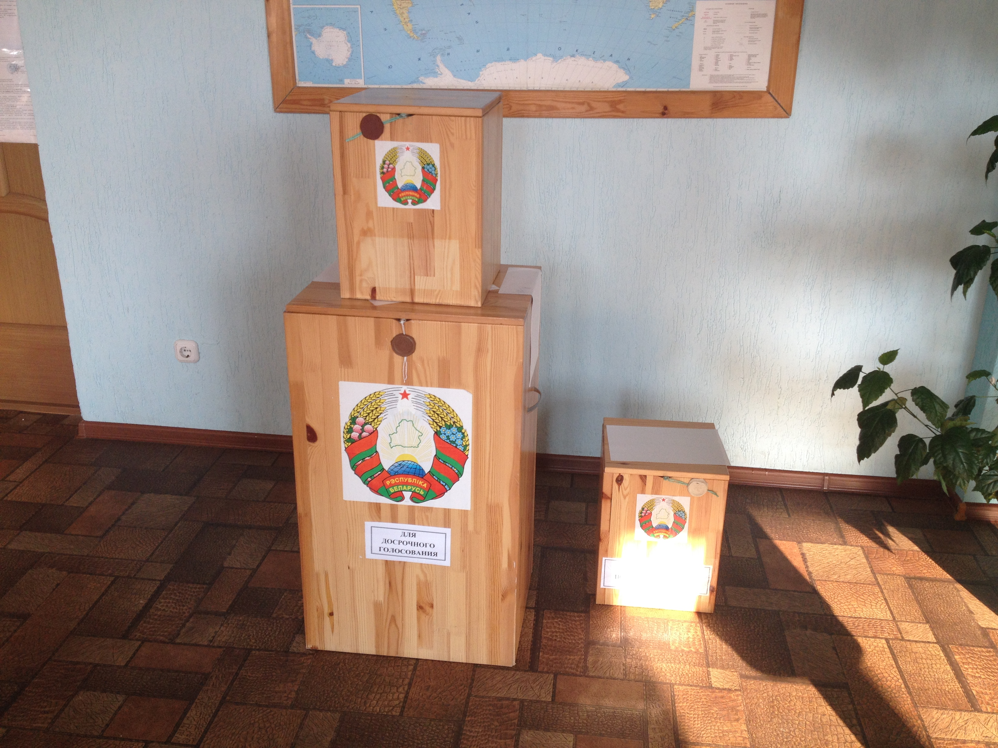 Wybory parlamentarne na Białorusi, 2017